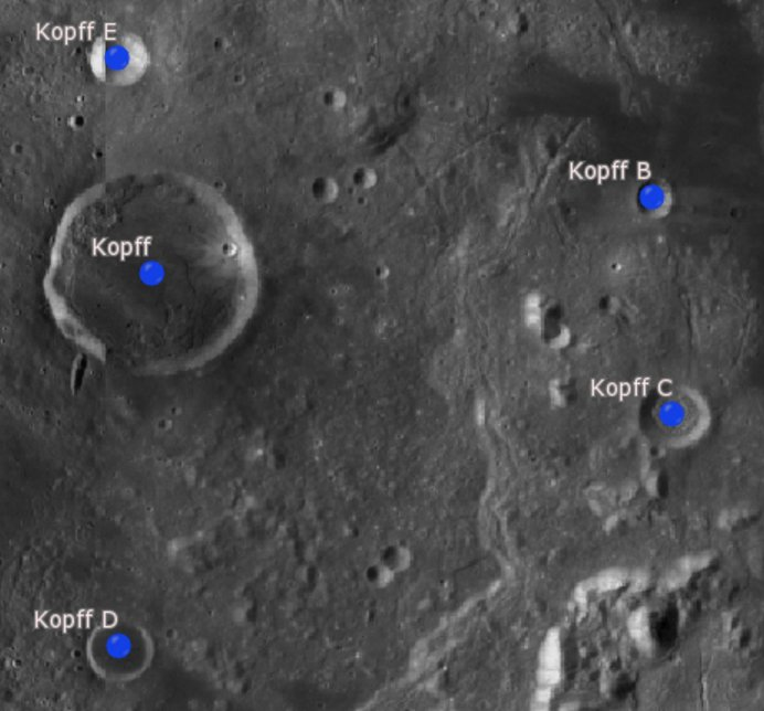 Cráter lunar Kopff. Cráteres Satélite. (Imagen LRO)